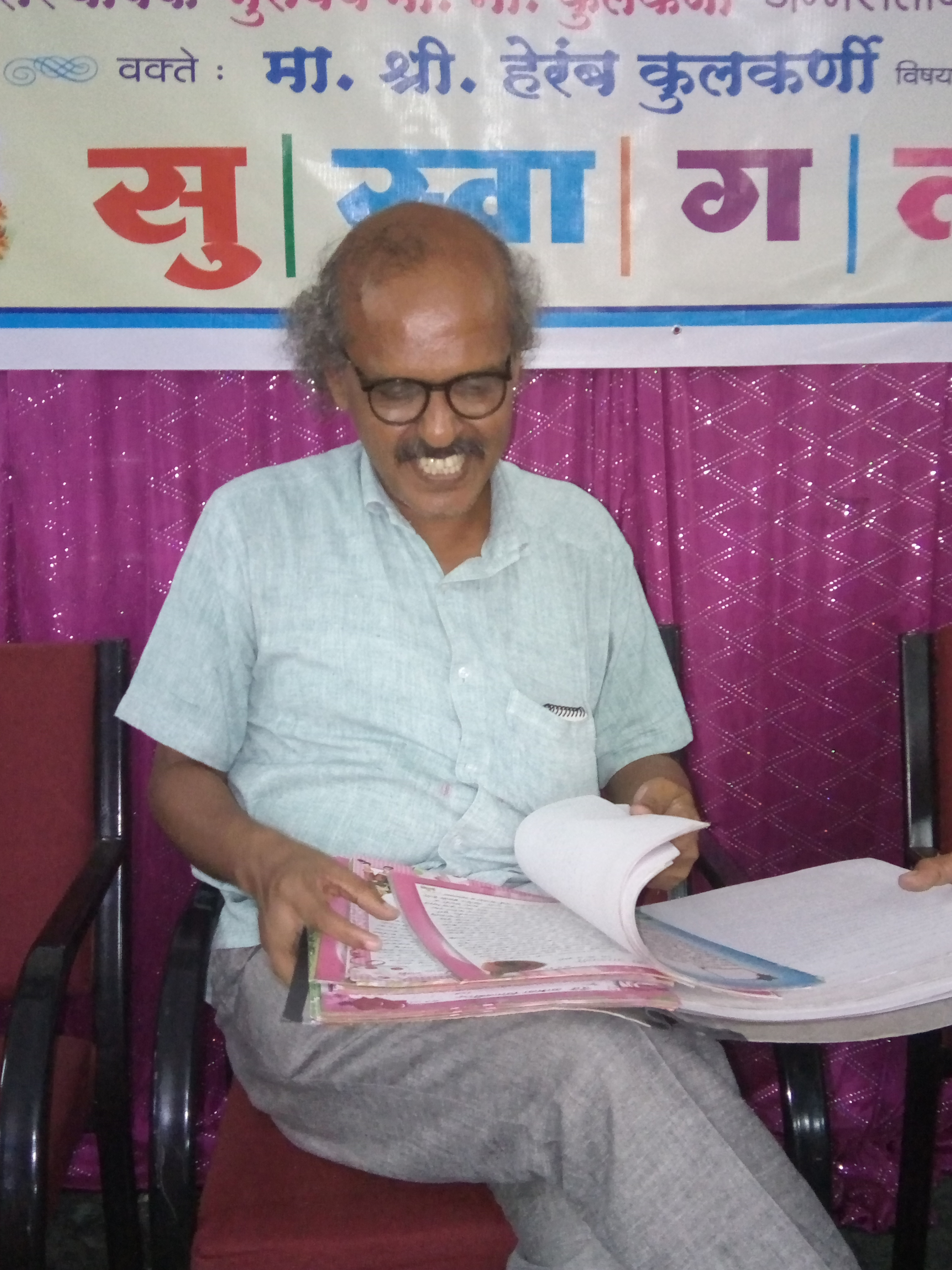 लेखक व सामाजिक कार्यकर्ते